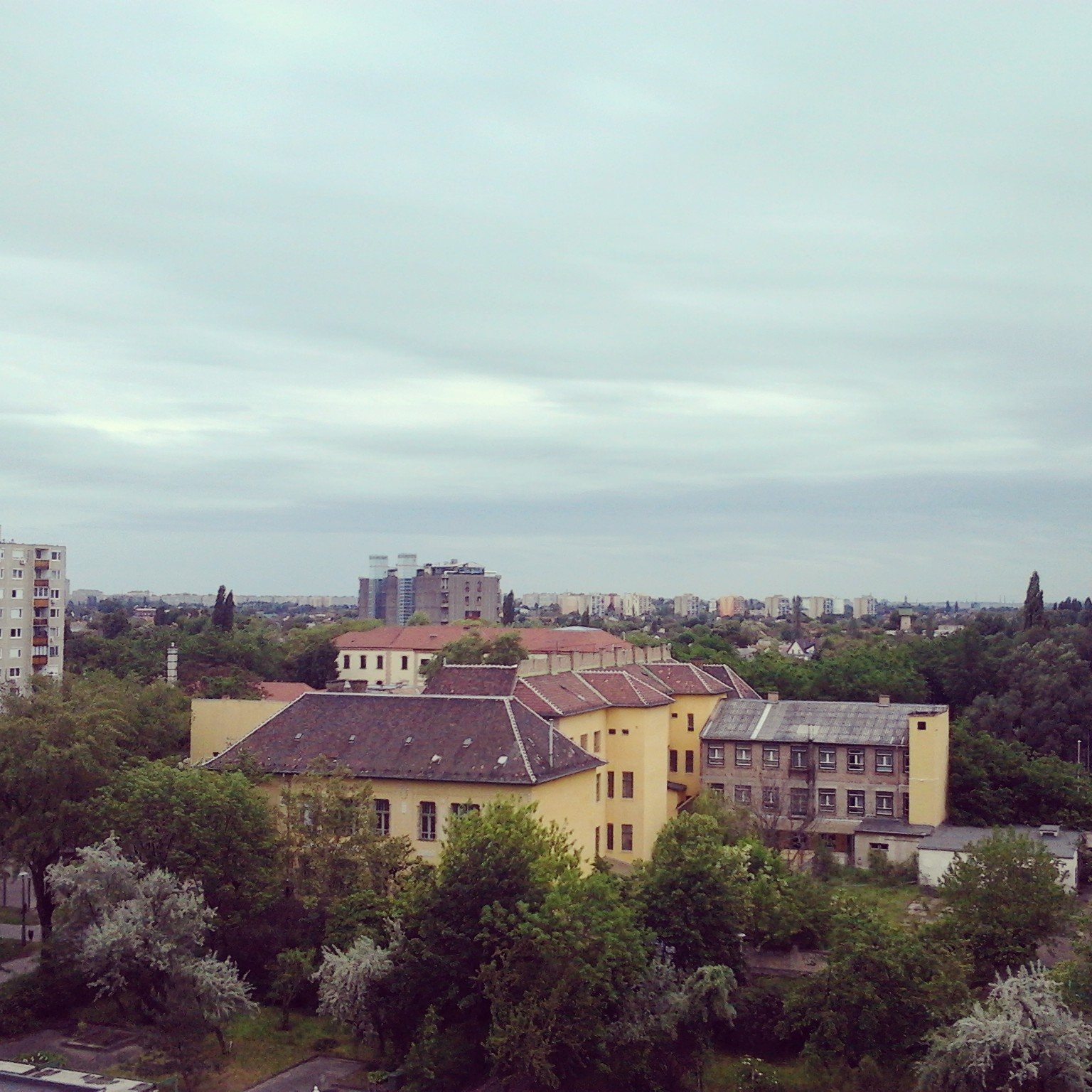 A Károli Gáspár Református Egyetem Állam- és Jogtudományi Karának épülete Újpesten (Budapest, IV. ker.)